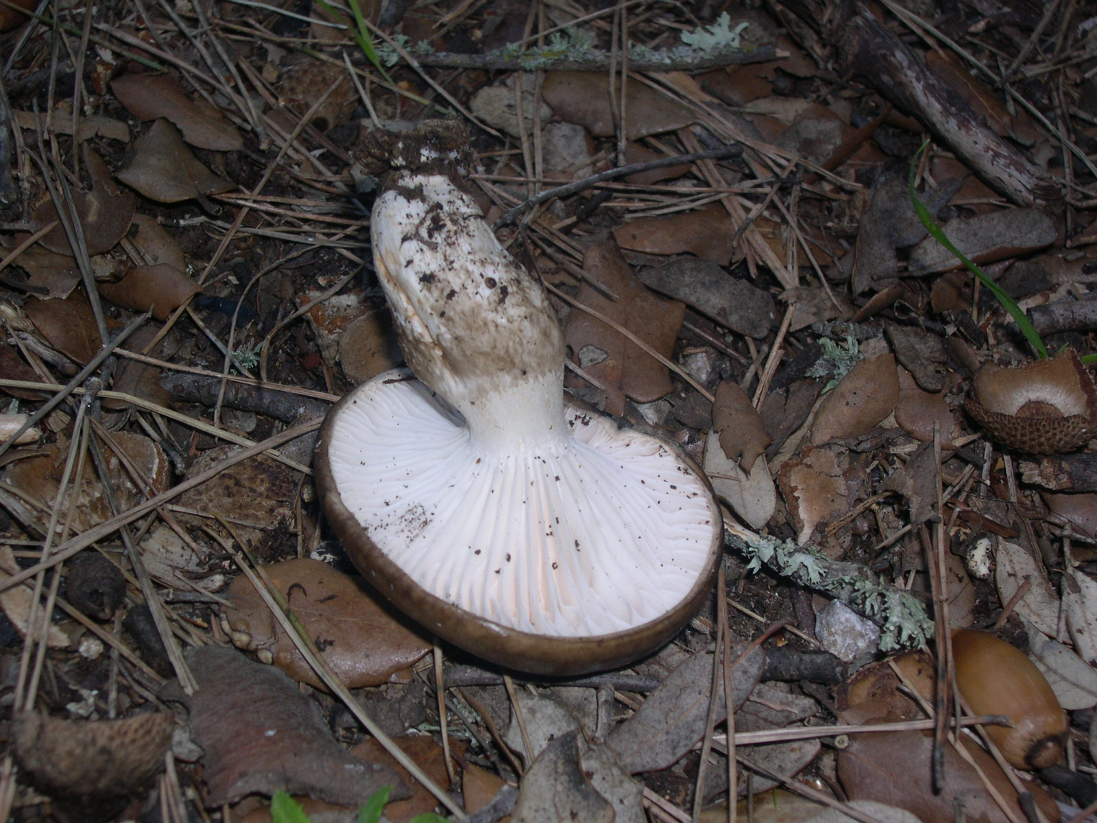 Llenega (Hygrophorus latitabundus), Mallorca.